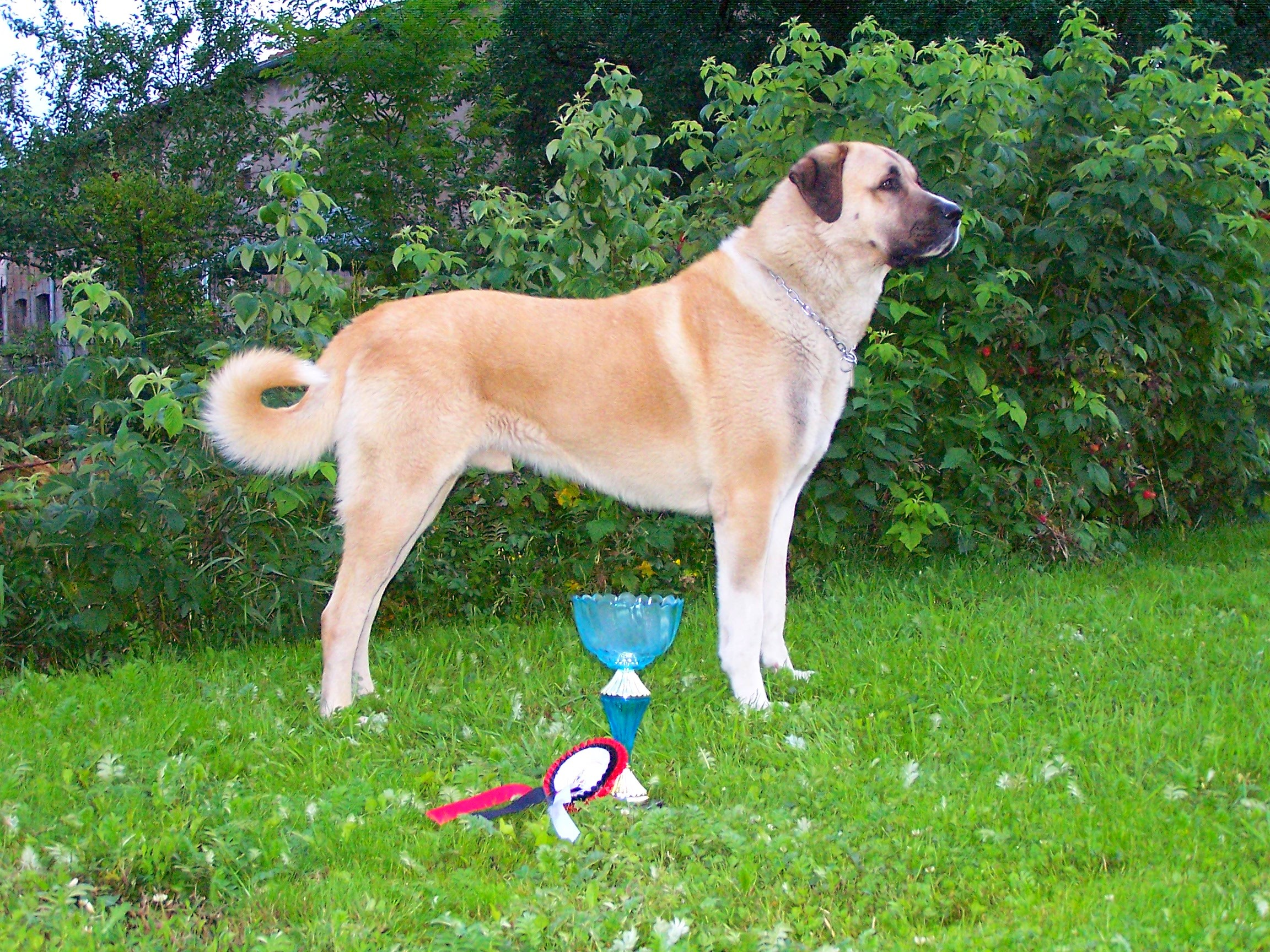 Varish(2CVX028) est Champion de France, Champion du Luxembourg, Champion d'Europe, Champion de Croatie, Champion de Belgique, Champion de Suisse, Champion de Hollande, Champion d'Allemagne. Mais également Varish est Champion du monde 2008 à Stockholm BOB et Best in show au WORLD WINNER CIRCUIT 2008 (SBHK)et multi vainqueur en Nationale d'élevage .Varish est un superbe Berger d'Anatolie né le 25/05/2004.Issue d'une lignée de champion(Ogan, Lipsos, Razi, Laika, Firat),son atavisme pour la protection est très profond ainsi qu'un énorme respect pour sa famille et pour les enfants.Ses mensurations sont de 80 cm au garrot et 64 kg.Vivant dehors, été comme hiver,il est très robuste et athlétique.